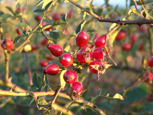 Églantines, fruits de l'Églantier. Contents 1 Auteur 2 Licence et droits d'auteur 3 Licensing 4 Original upload log Auteur Photographie prise en octobre 2004 par Spone Site perso Licence et droits d'auteur Sous licence GFDL. J'autorise l'utilisation à condition que mon nom (Hans "Spone" Lemuet) soit cité. J'apprécie également que l'on m'avertisse par e-mail à . Cette photographie est disponible en très haute qualité (2592 x 1944 pixels - 5 mégapixels) auprès de son auteur, sur simple demande. Hans "Spone" Lemuet octobre 2004